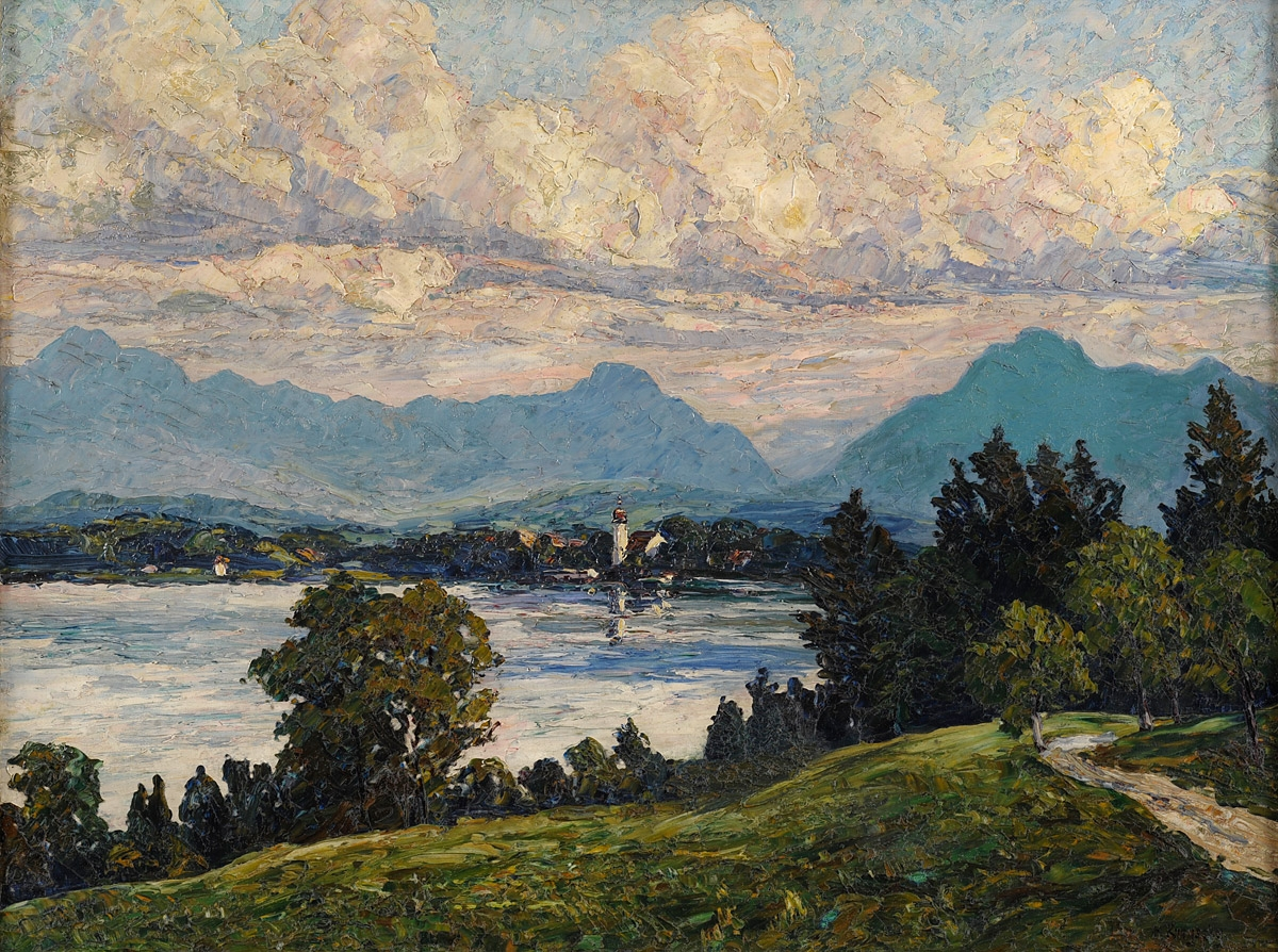 "Abend am Starnberger See/Seeshaupt"